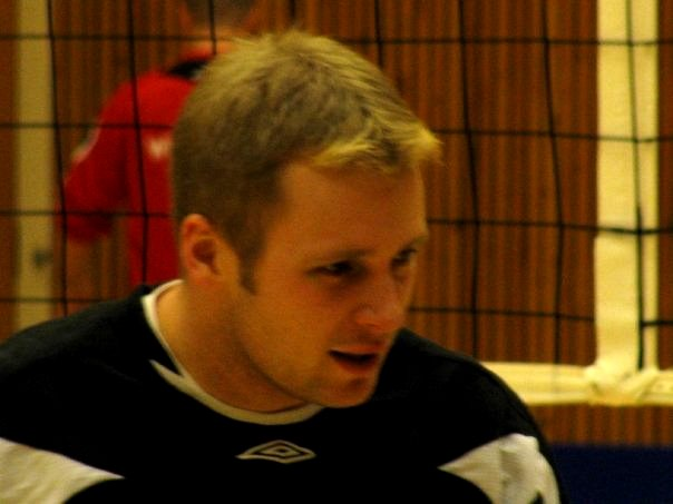 Lentopalloilija Jukka Meskanen